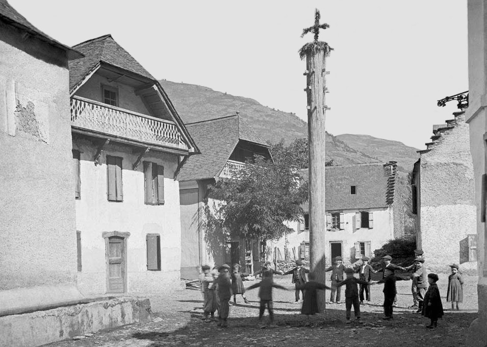 Imatge